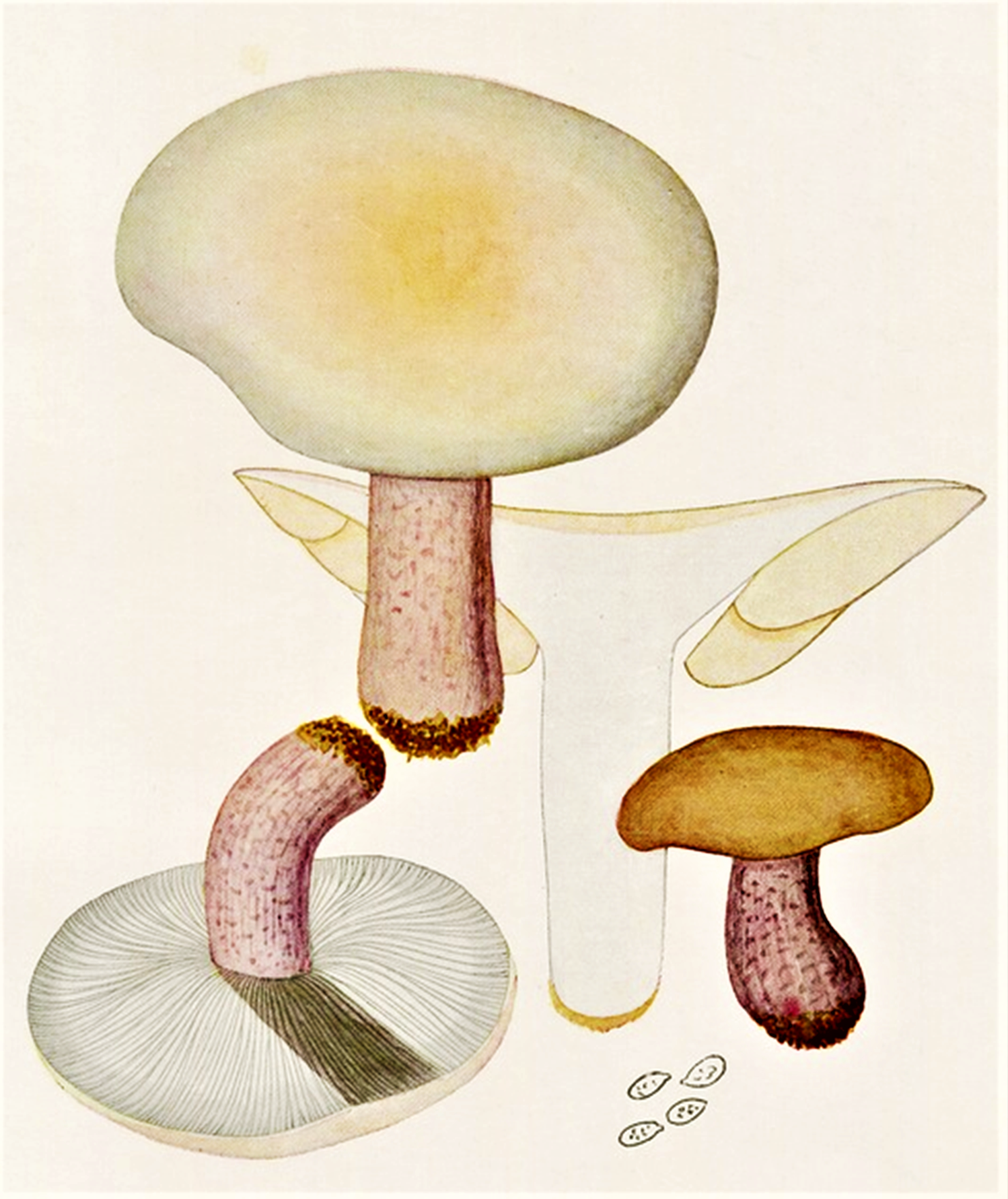 Tricholoma personatum Fr. var. anserinum Sacc., 1887 (nicht Berk.), heute Lepista personata (Fr.) Cooke (1871)